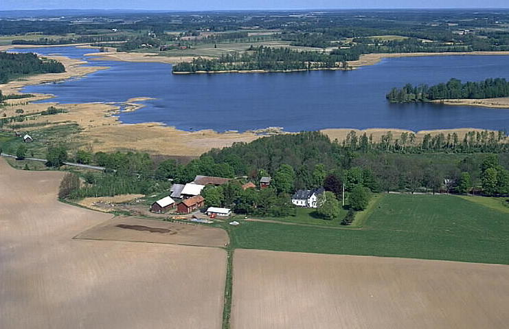 Lilla Vretstorp, i bakgrunden Vibysjön. Motiv: Vretstorp Nyckelord: Flygbilder, Riksintressen Kategori: Insjömiljöer, Bondgård Lilla Vretstorp, i bakgrunden Vibysjön.